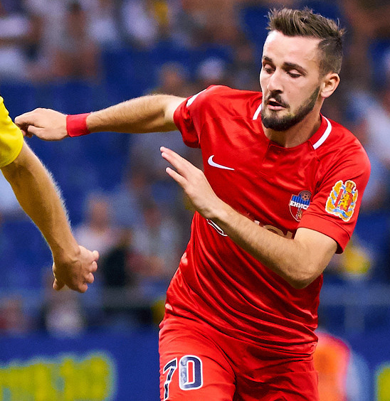 Разгром по-ростовски. Карпин против Аленичева